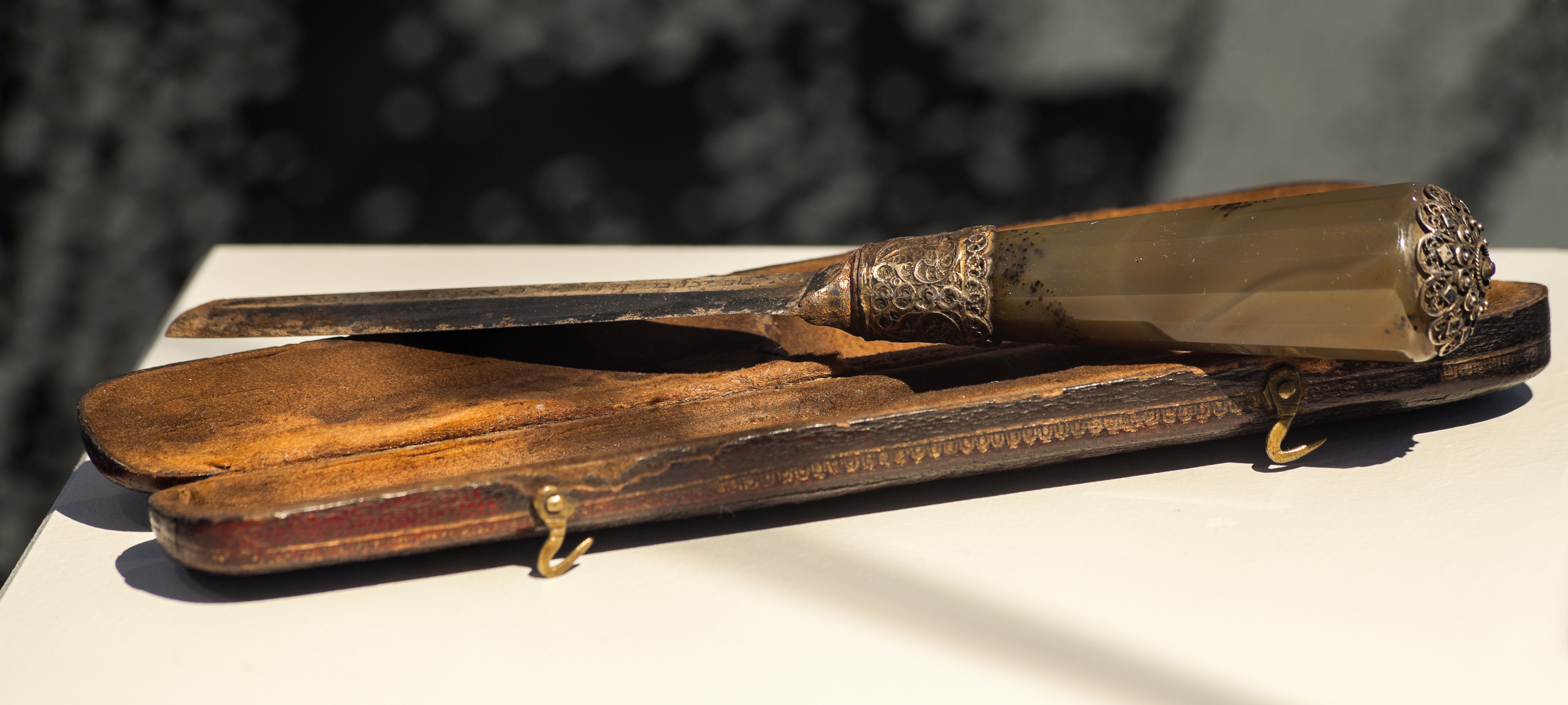 Beschneidungsmesser mit Etui aus dem Museum für Kunst und Gewerbe, zur Zeit (Stand August 2012) im Museum für Hamburgische Geschichte ausgestellt.